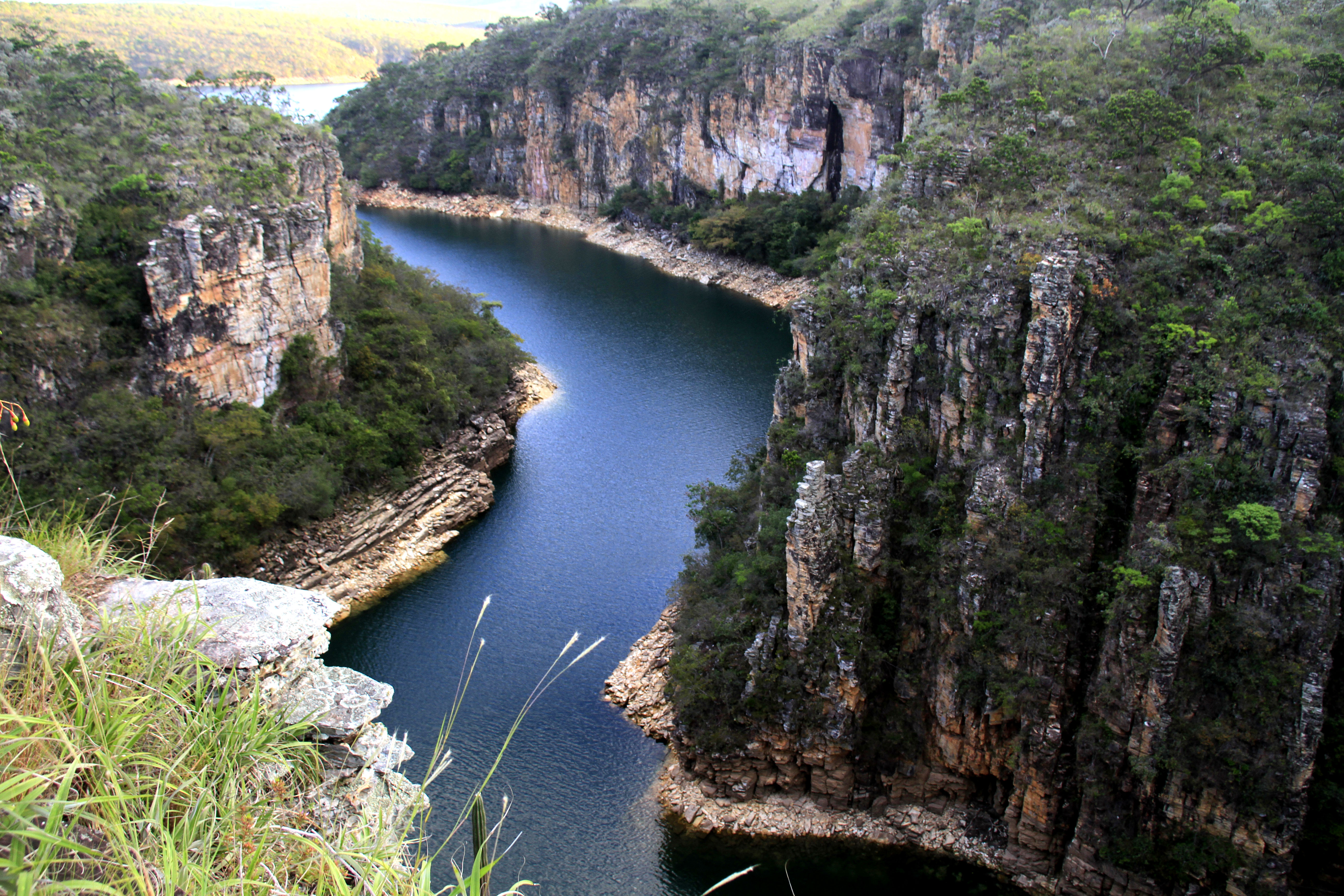 fim de tarde no canyon de capitolio mg.